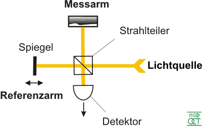 Interferometer-Prinzip